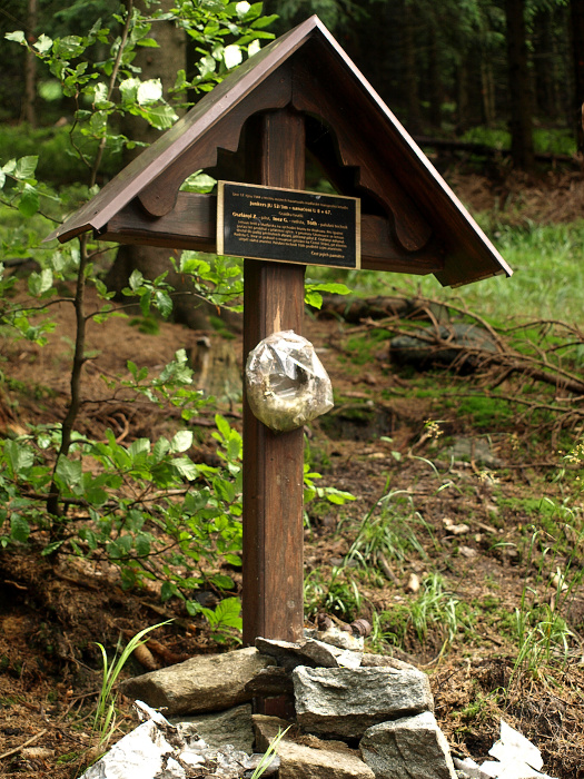 Česky: Památník letecké tragédie